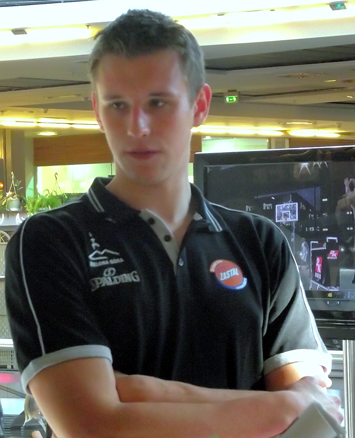 Rafał Rajewicz podczas prezentacji Zastalu Zielona Góra przed sezonem 2011/12.